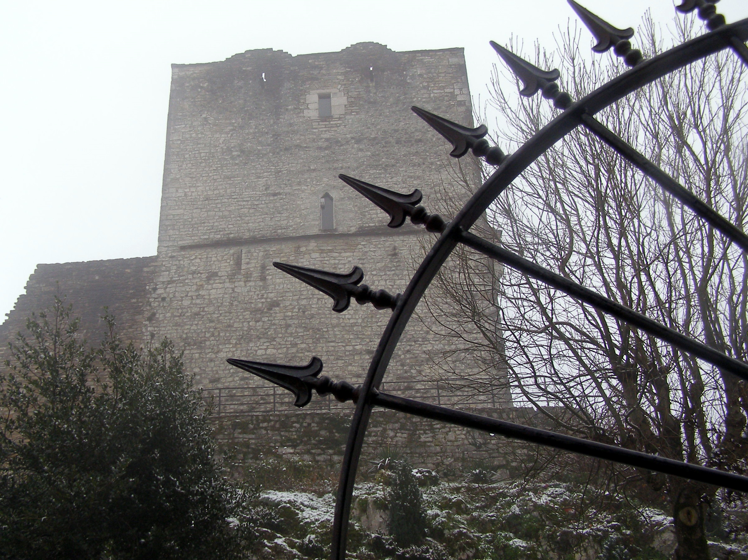 Tour médiévale (ancien donjon du château du XI°)